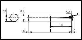 ISO 8745